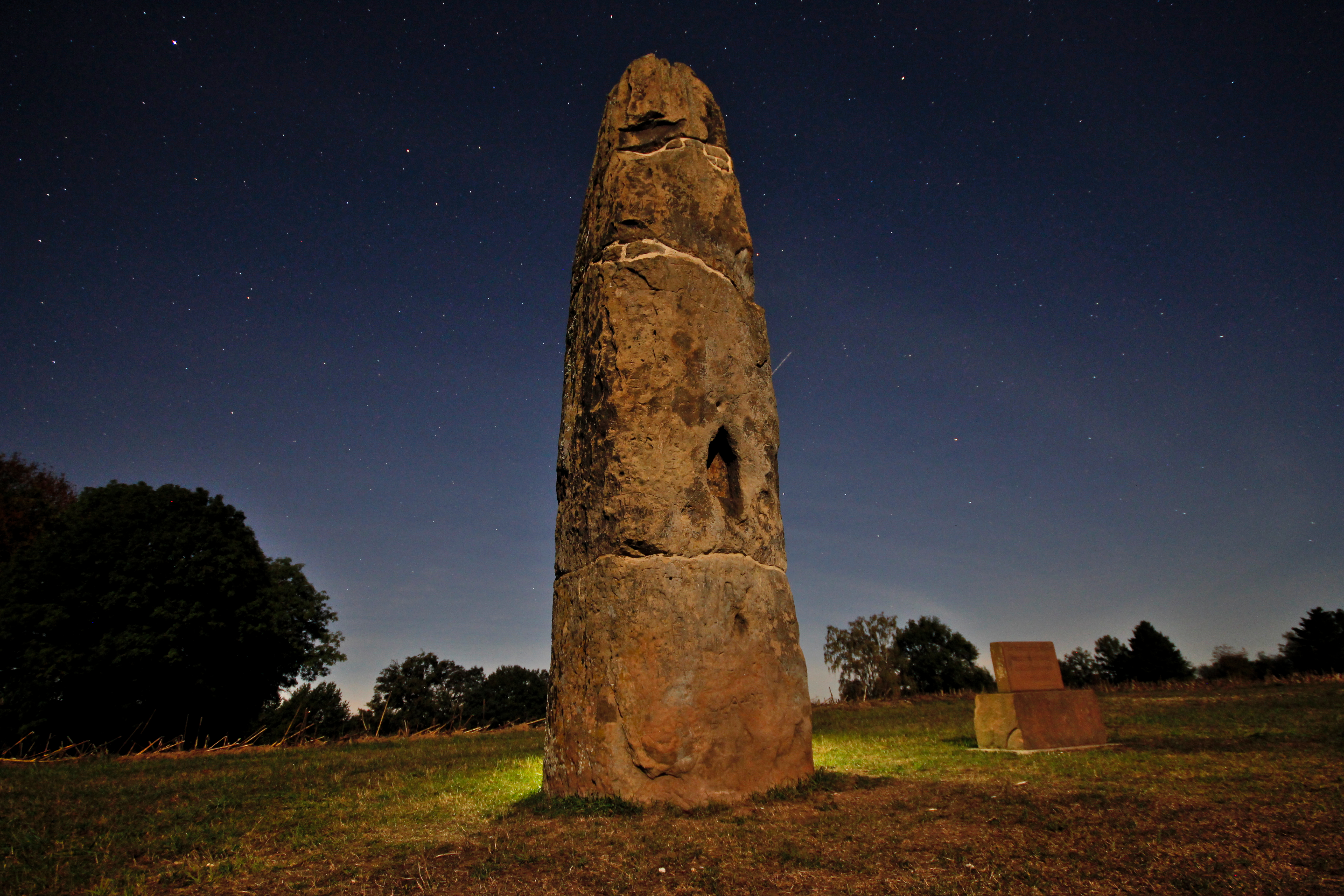 Das ist der Gollenstein, fotografiert in einer Vollmondnacht. Das Denkmal steht im Saarland auf dem Berg der kleinen Stadt Blieskastel in der Gollensteinstraße. ( Koordinaten: N 49° 14.677', E 7° 14.974' )